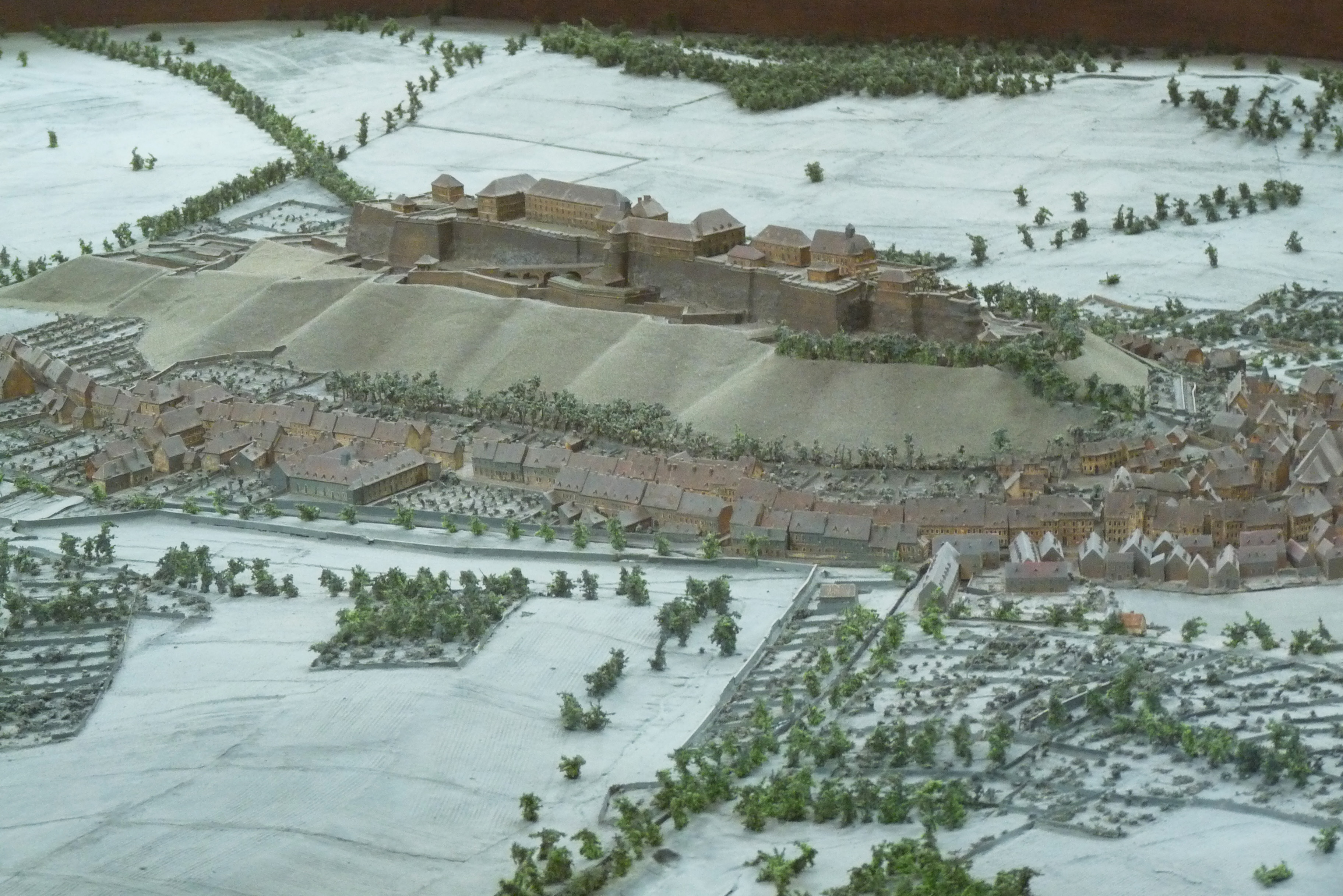 Citadelle de Bitche : plan-relief original de Bitche (1794, échelle 1:600, dimensions 4,20 m x 3,50 m). Classé Monument historique en 1983.